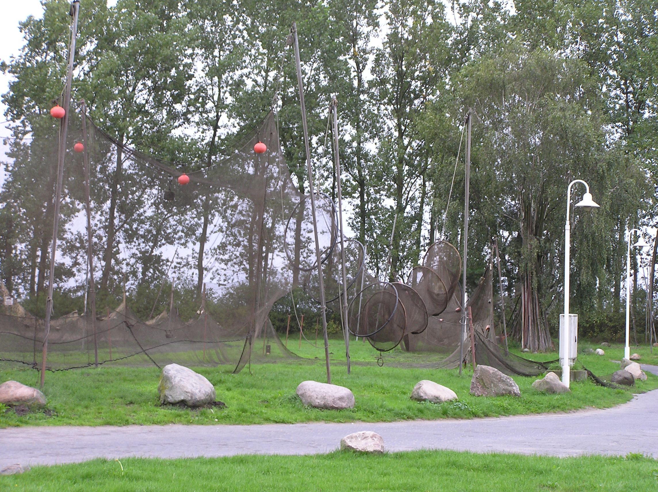 Freest_Fischerhafen